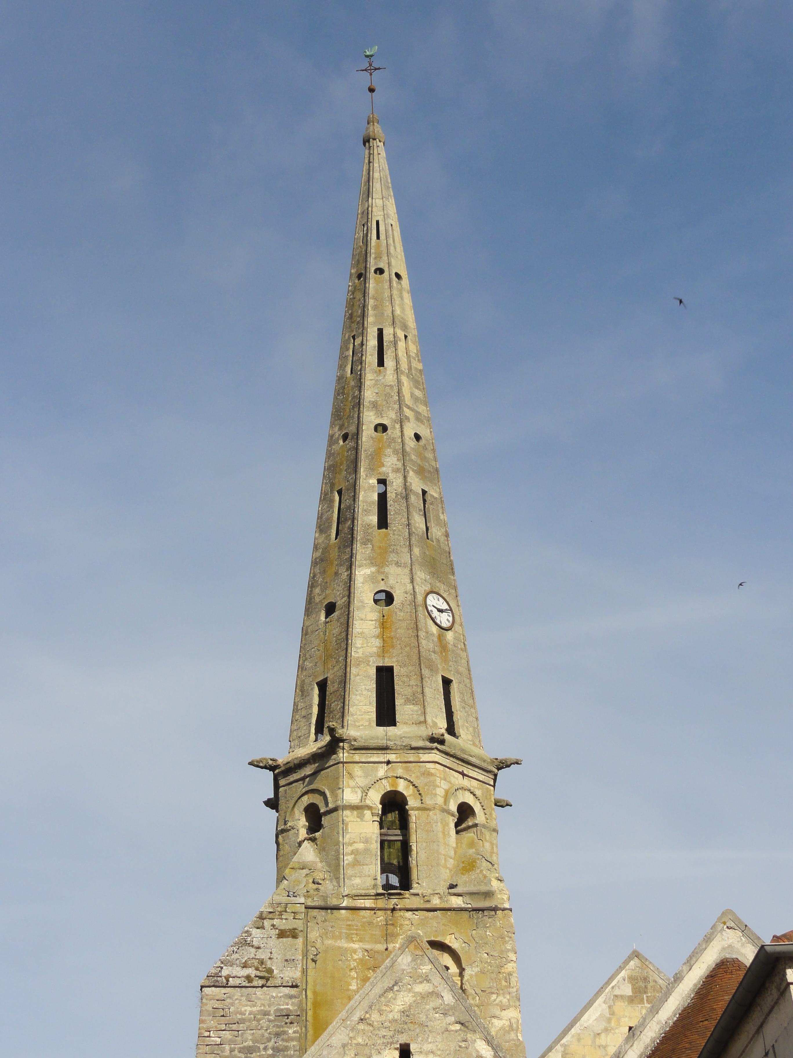 Église Saint-Pierre-et-Saint-Paul d'Acy-en-Multien (voir titre).